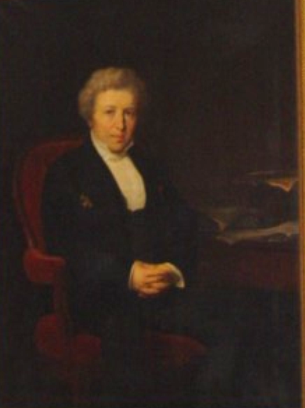 Tableau du Comte Bérenger au Conseil d'état